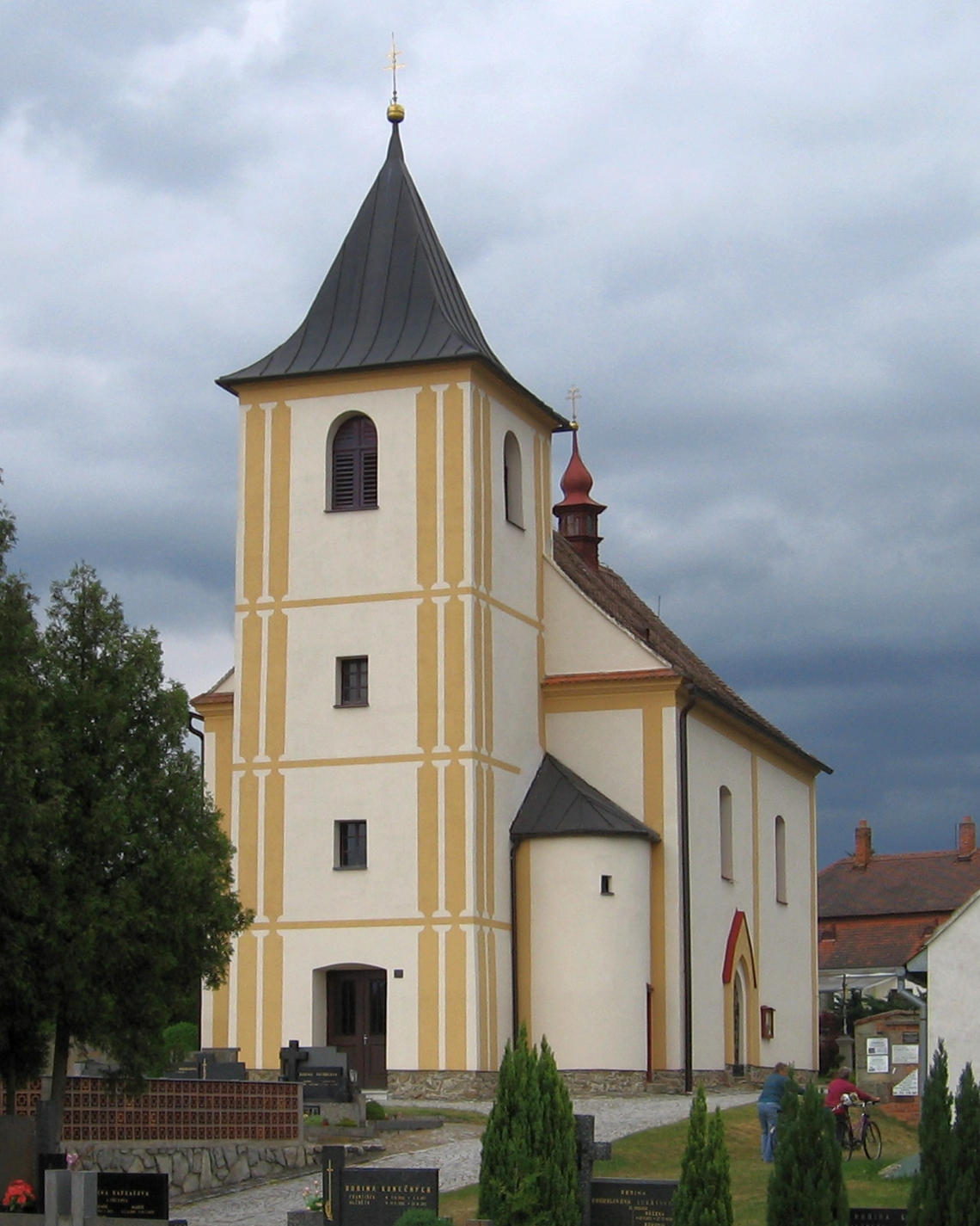 Hartvíkovice - kostel sv Jiljí, průčelí s věží.